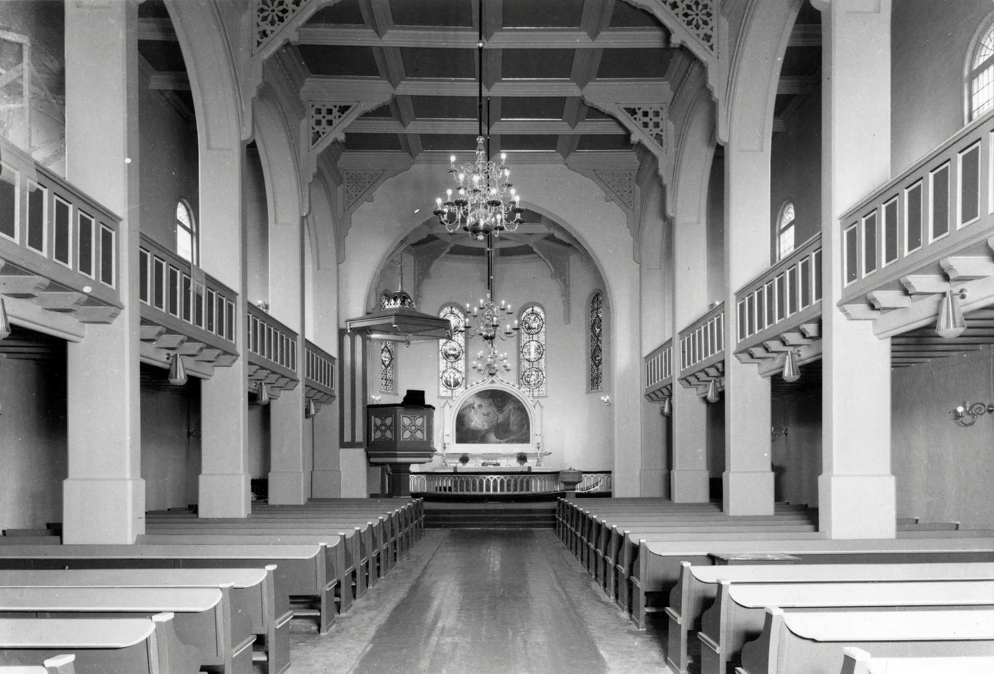 Interiør i Tangen kirke, Drammen